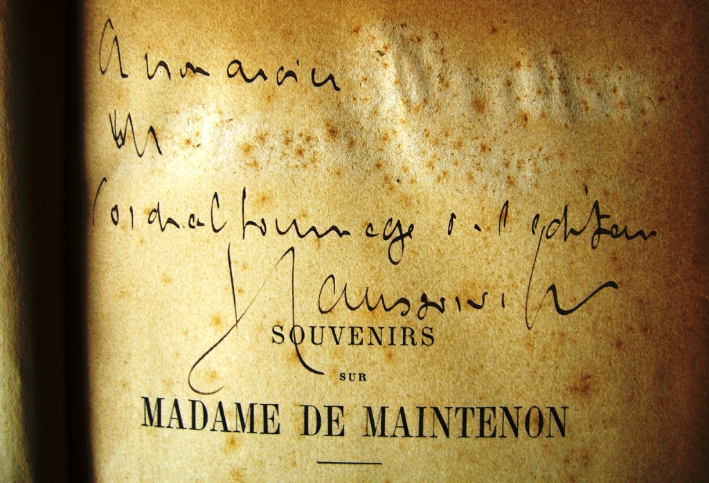 Firma de Gabriel Paul Othenin de Cléron, comte d'Haussonville, en una primera edición de Souvenirs de Mme de Maintenon